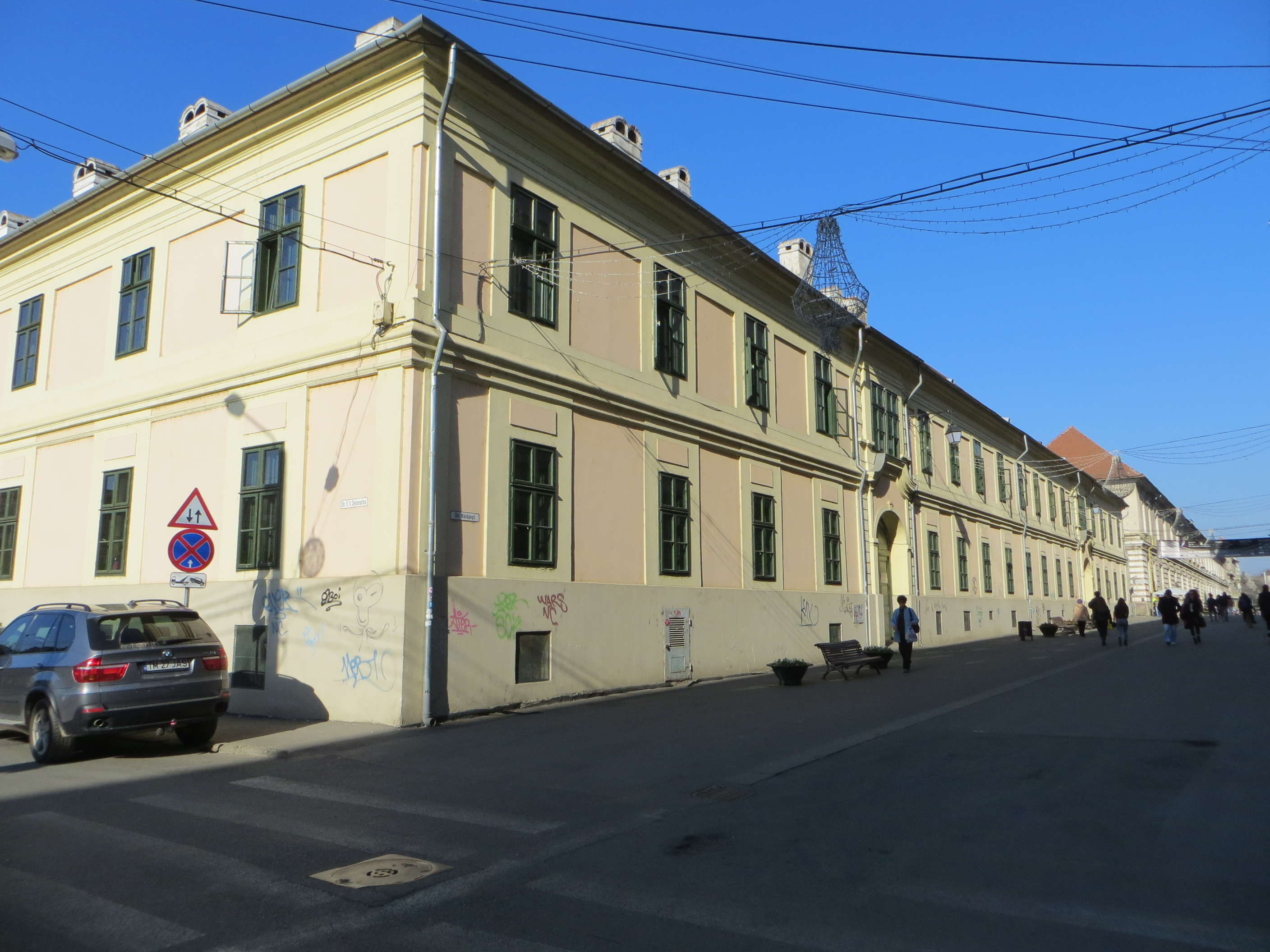 Spitalul orășenesc, azi Spitalul de oncologie și dermato-venerice